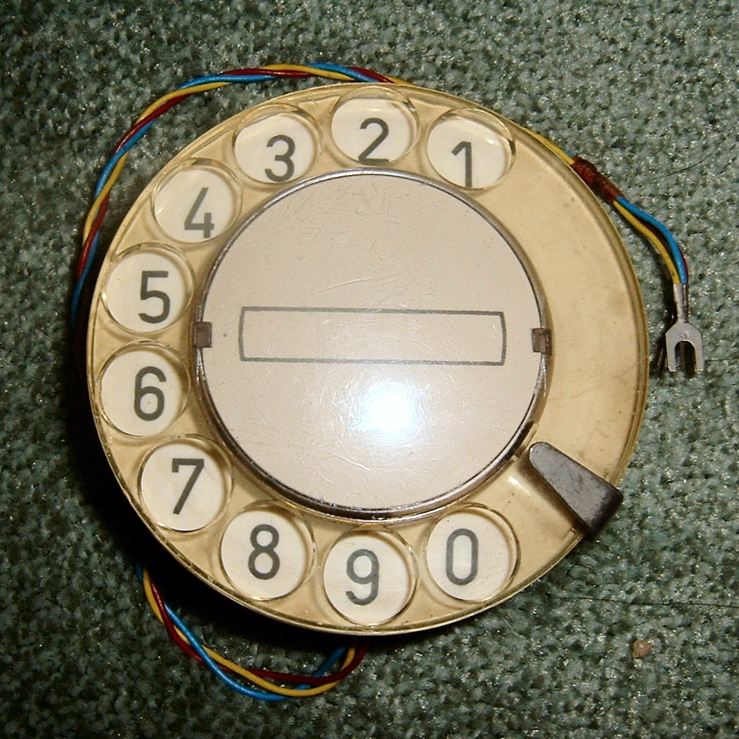 Kiesschijf van een T-65 telefoon